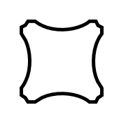 Bangalore Blade